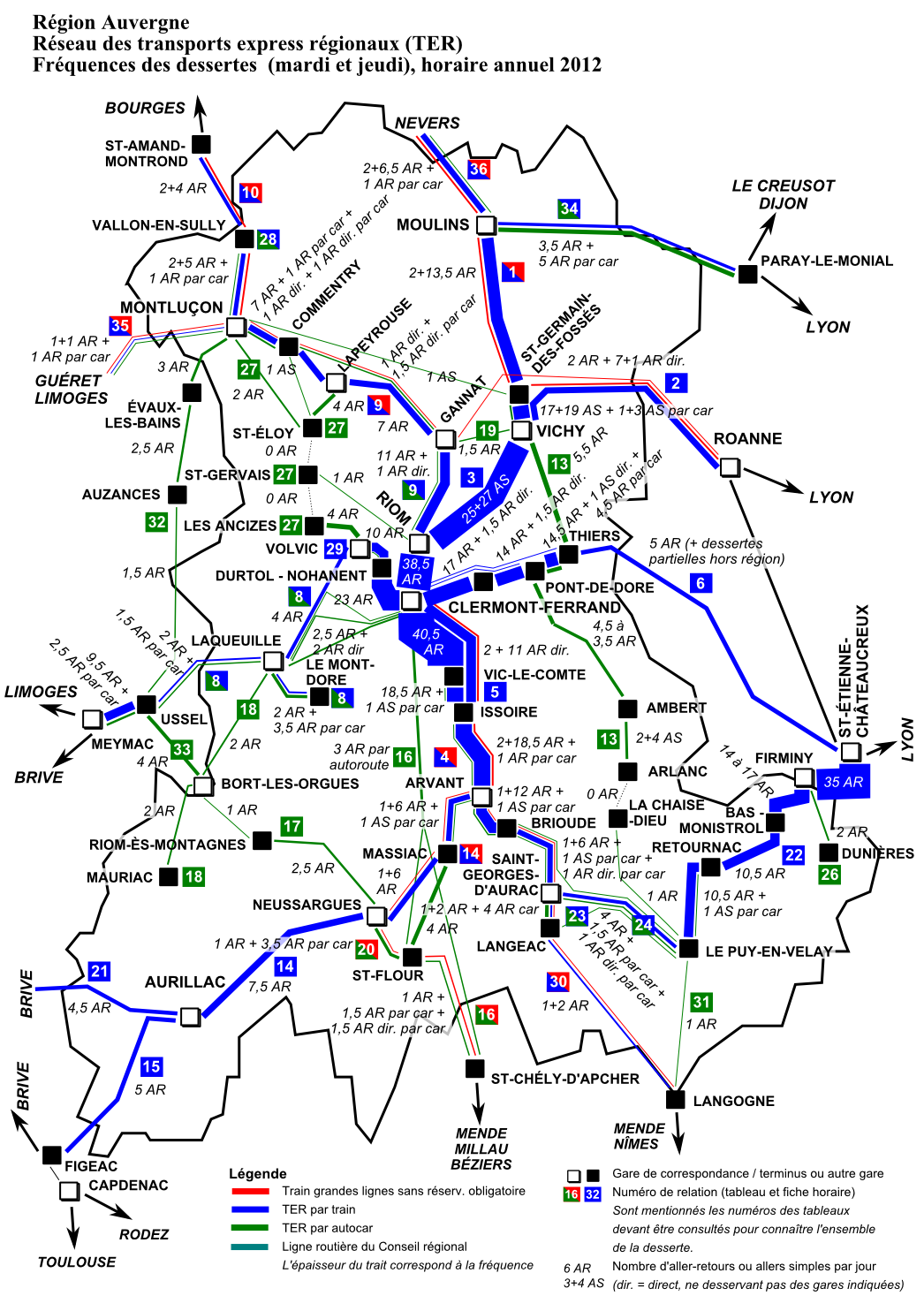 TER Auvergne, fréquence de la desserte les jours-type de pleine semaine (mardi et jeudi), horaire annuel 2012.